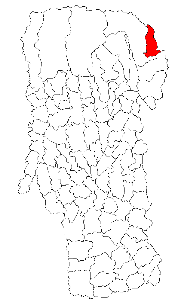 Categorie:Hărţi ale judeţului Argeş